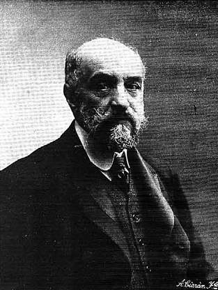 Retrato de Manuel Aníbal Álvarez, obra del fotógrafo Kaulak, recogido en la revista española La Ilustración Española y Americana.